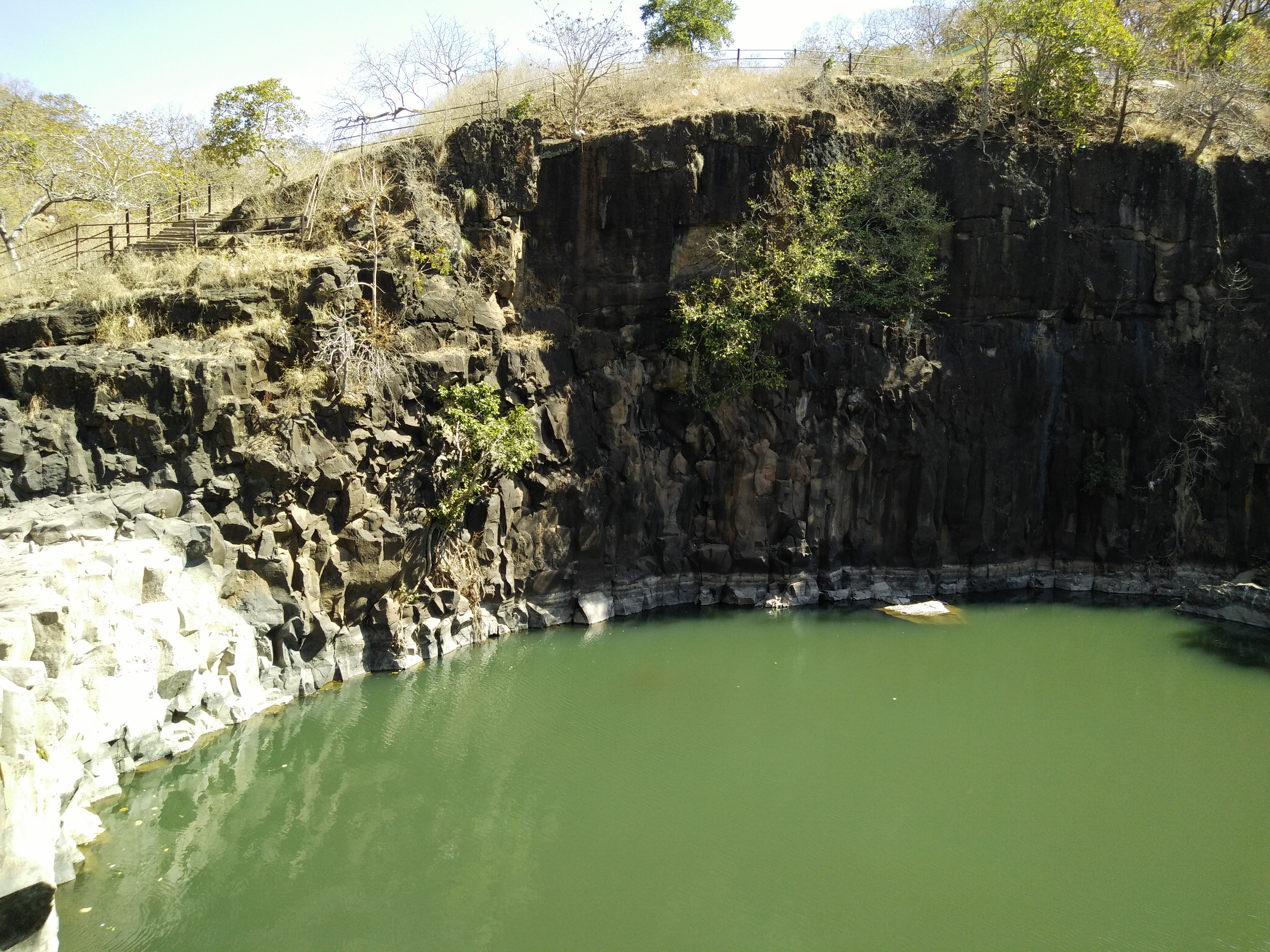 इसी कारण इस जगह पर दर्शनार्थीयों की भीड़ रहती है